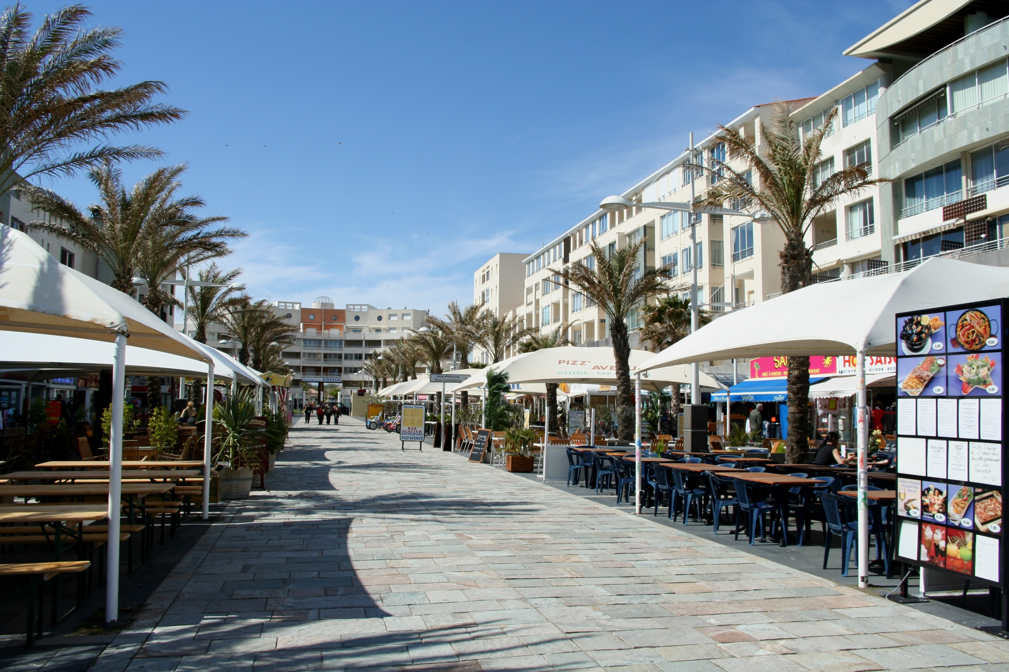 Le mail de Rochelongue au Cap d'Agde, Hérault